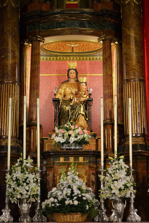 Santa María del Alcor en el altar mayor de la iglesia.